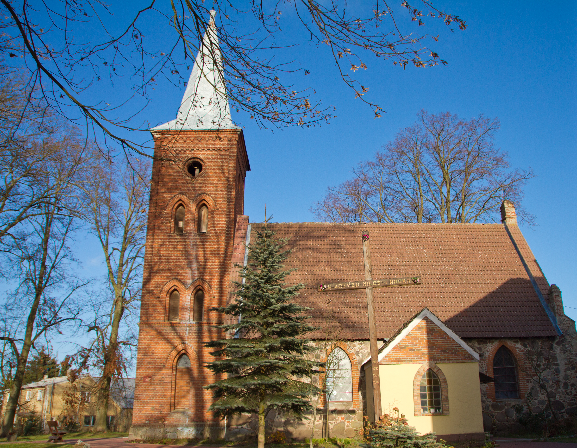 Mieszewo, kościół par. p.w. św. Józefa, kon. XV, 2 poł. XIX